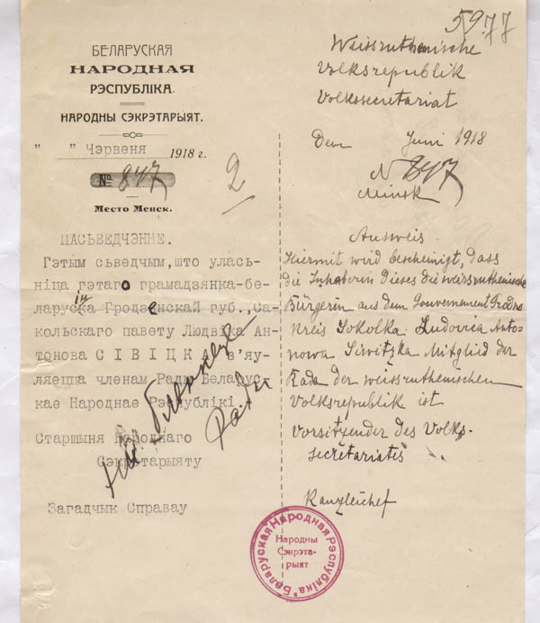 Пасведчанне сябра Рады БНР, выдадзенае Людвіцы Сівіцкай (Зосьцы Верас).